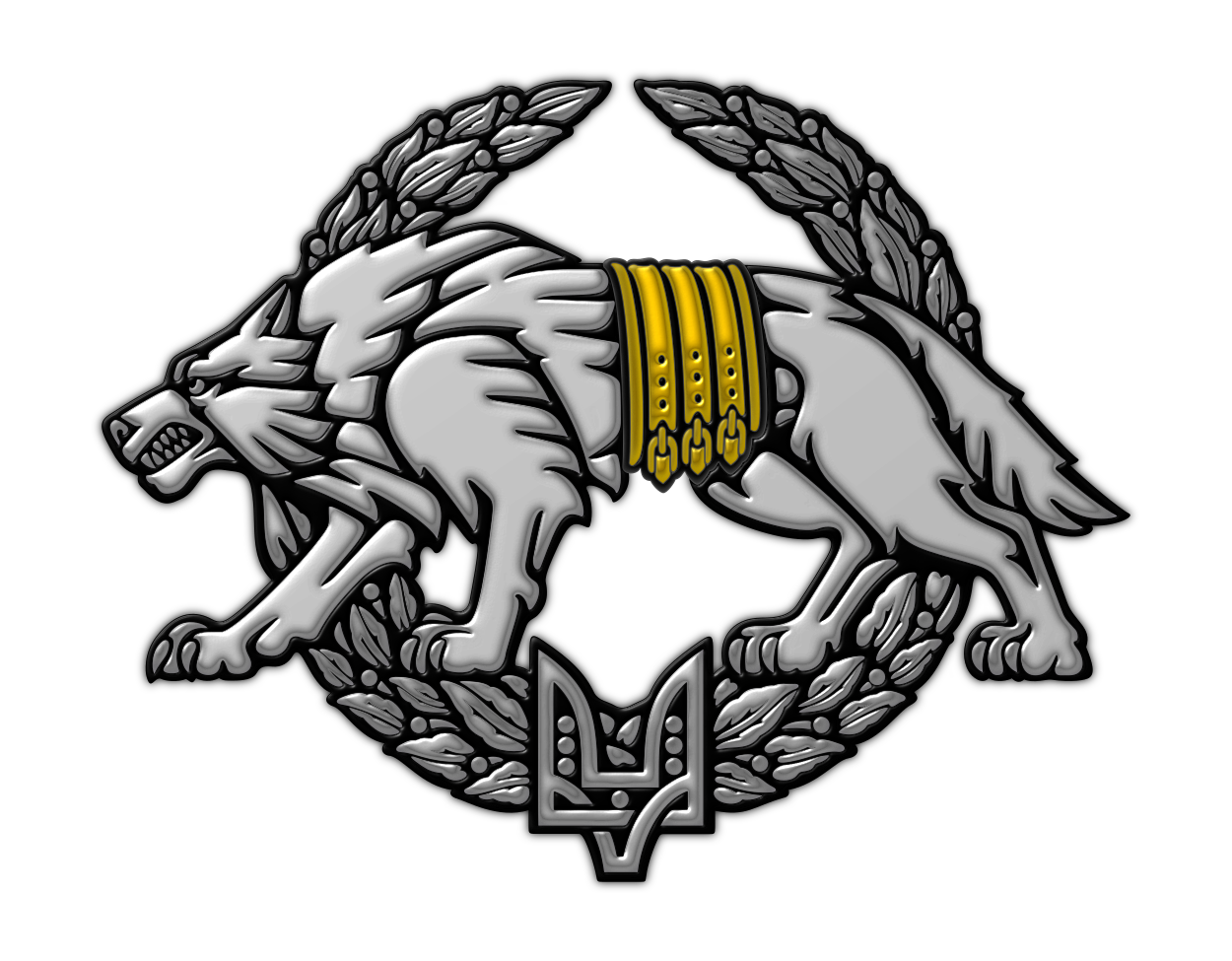 Беретний знак сил спеціальних операцій.